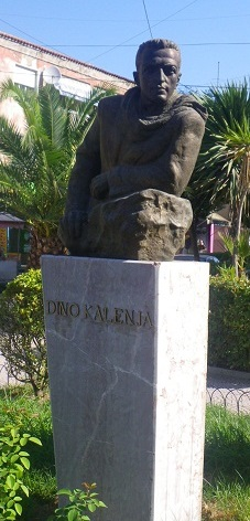 Dino kalenja